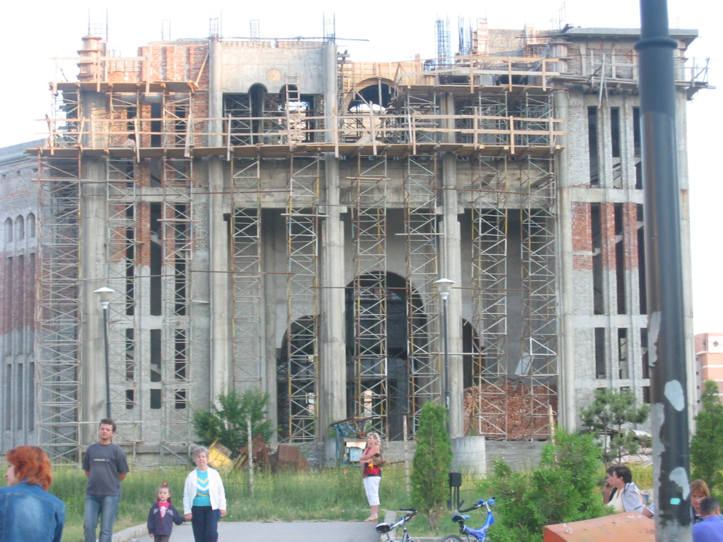 Biserica "Sfinţii Petru şi Pavel", în construcţie din 1995 - Saint Peter and Paul church